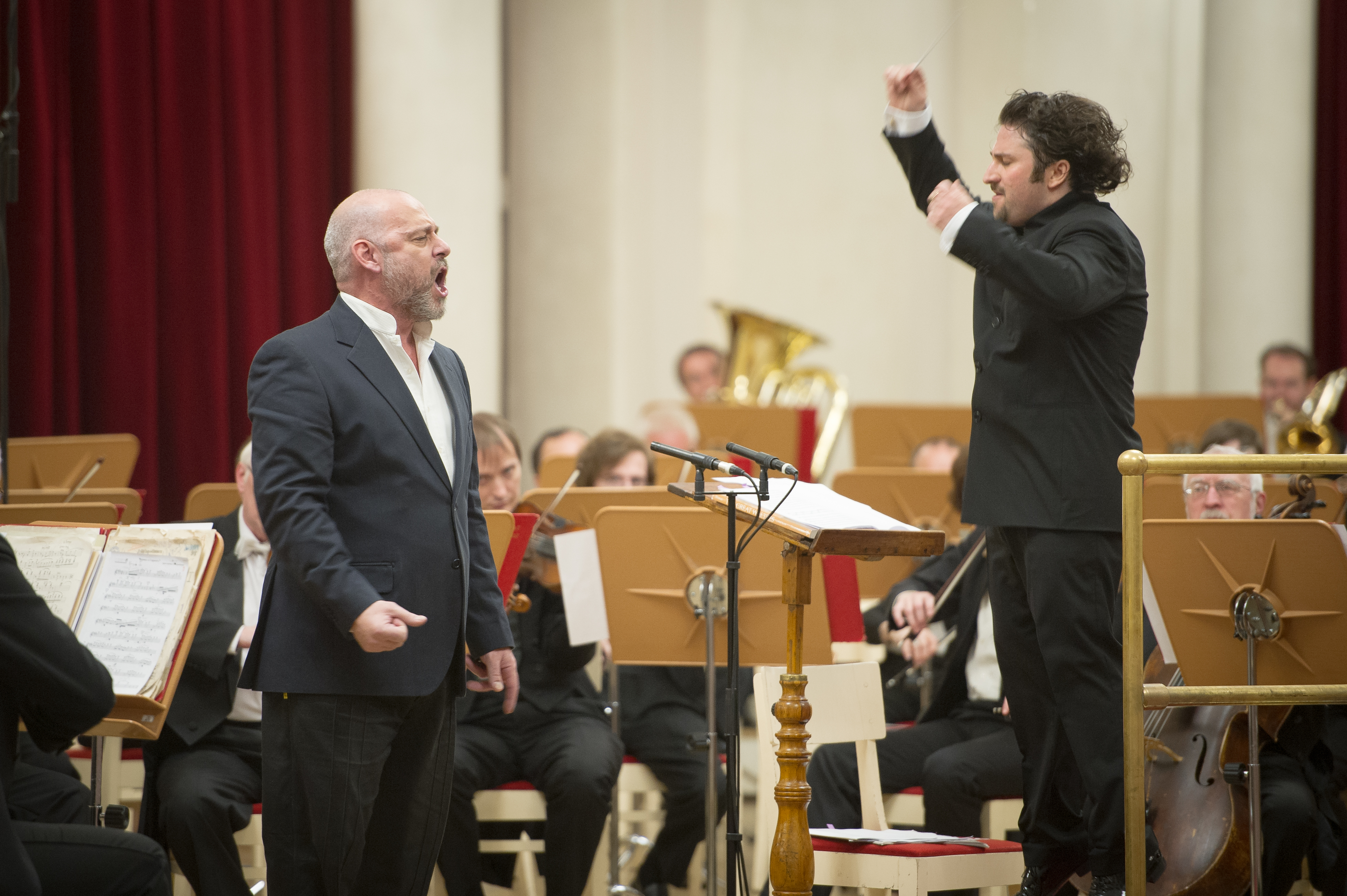 San Petersburgo, 6 de junio de 2015 - El tenor Darío Volonté junto a la soprano Marina Silva presentaron un concierto de Gala de Ópera en el Teatro de la Filarmónica de San Petersburgo como parte de las jornadas de intercambio cultural bilateral que se están llevando a cabo entre ambos países.